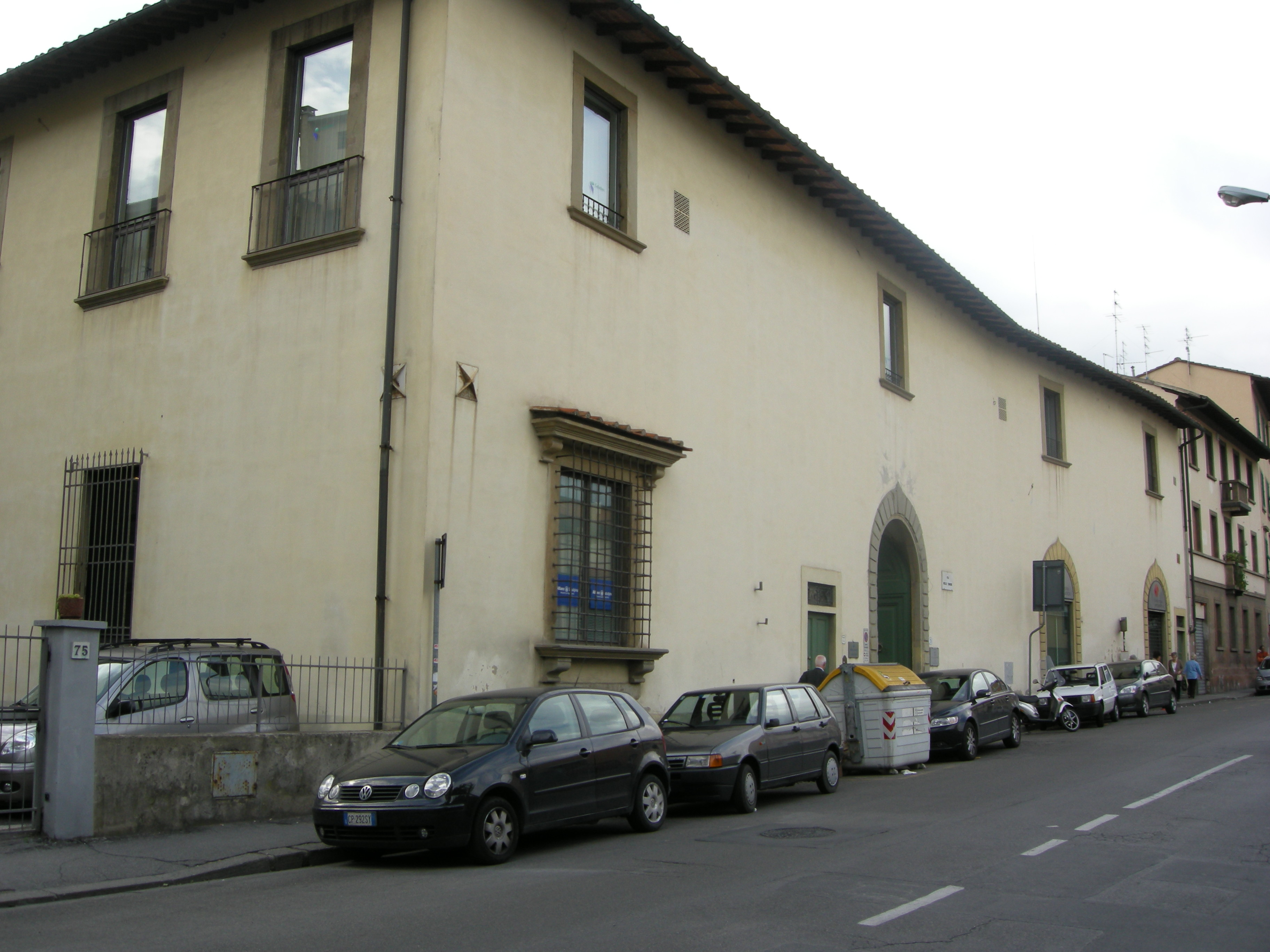 Villa guicciardini